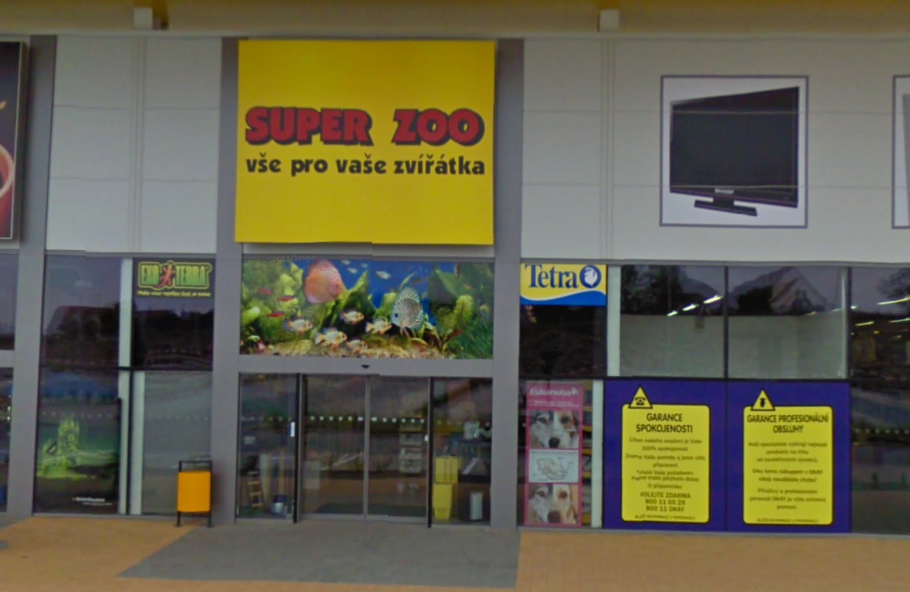 Prodejna SuperZoo v Třebíči